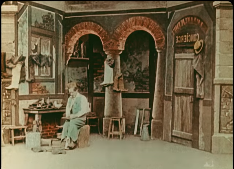 Photo extraite de "Un Locataire diabolique" (1909) de George Méliès